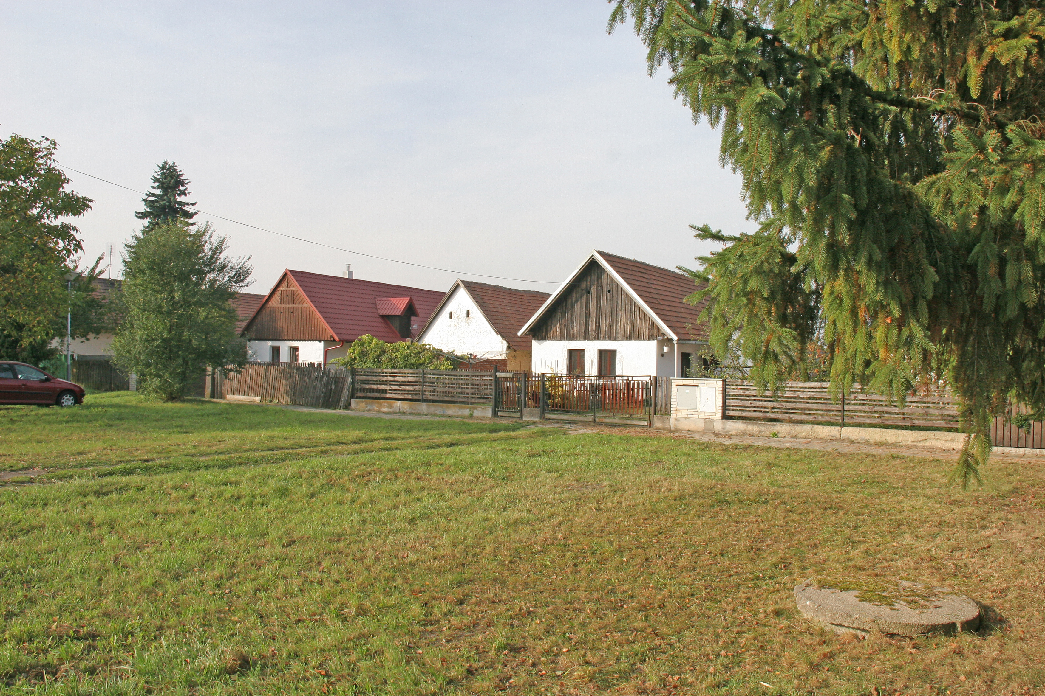 Nový čp. 12